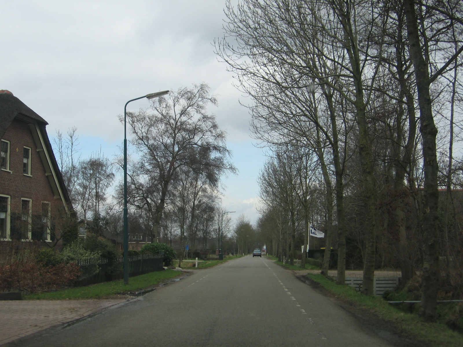 Zevenhuizen bij Amersfoort